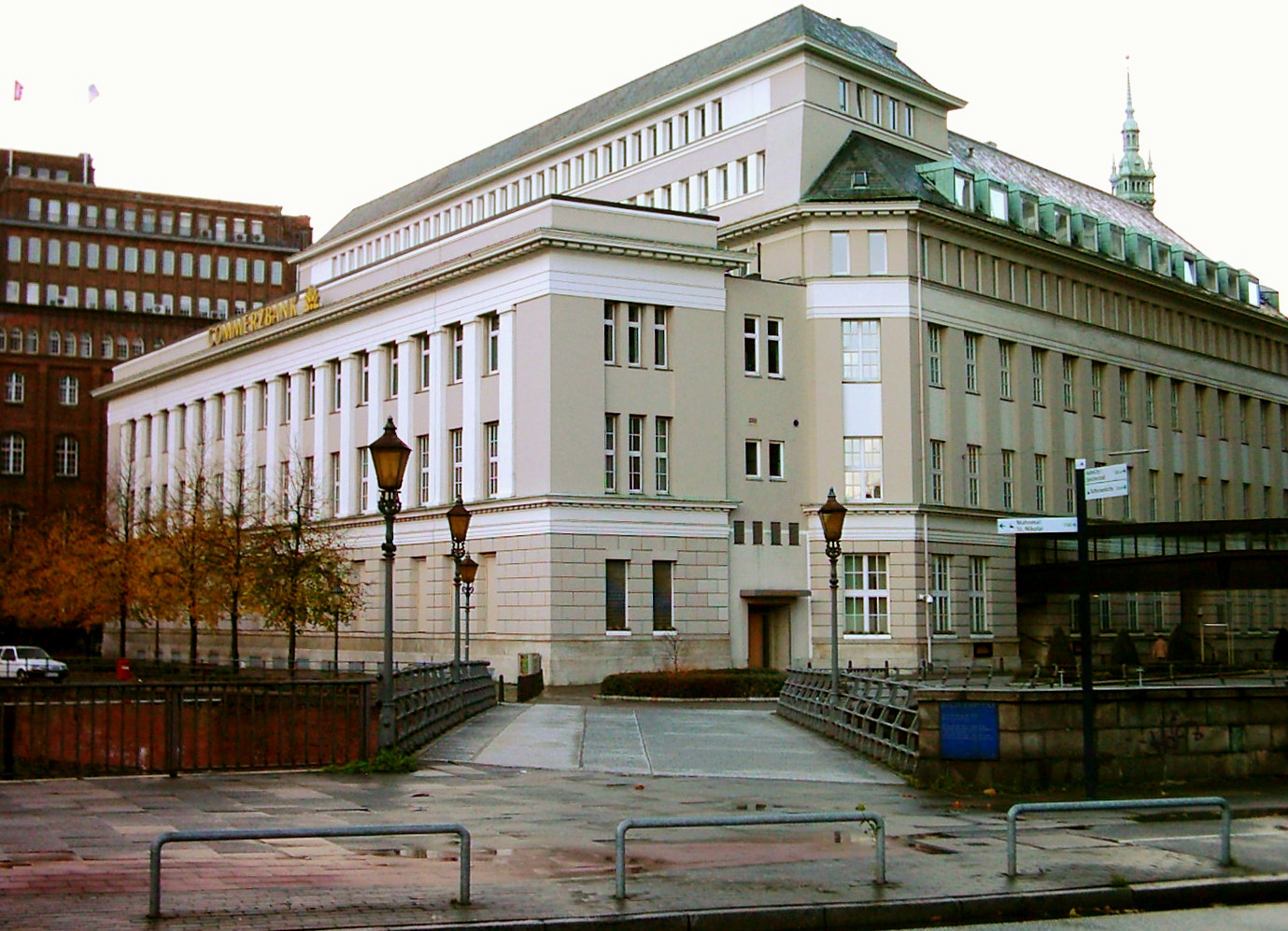 Die Zollenbrücke, älteste Fleetbrücke Hamburgs. Im Hintergrund die Commerzbank.This is a photograph of an architectural monument.